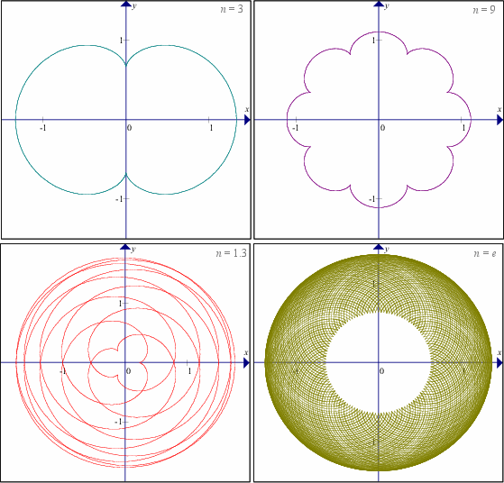 四个外摆线的例子。 (--Created by myself--)